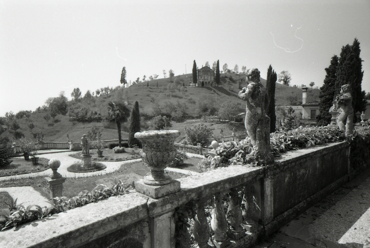 Servizio fotografico : Asolo, 1966 / Paolo Monti. - Strisce: 1, Fotogrammi complessivi: 6 : Negativo b/n, gelatina bromuro d'argento/ pellicola ; 35 mm. - ((I fotogrammi hanno una doppia numerazione. - Sul portanegativi: Leica Agfa IF. - Occasione: Pubblicazione